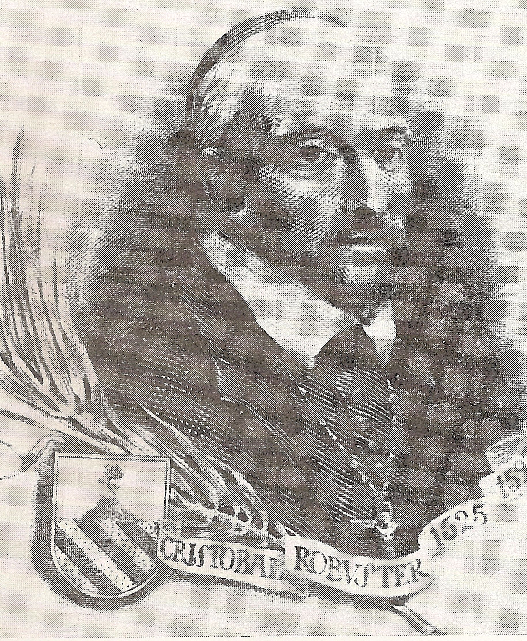 Imatge de Cristòfol Robuster, religiós reusenc